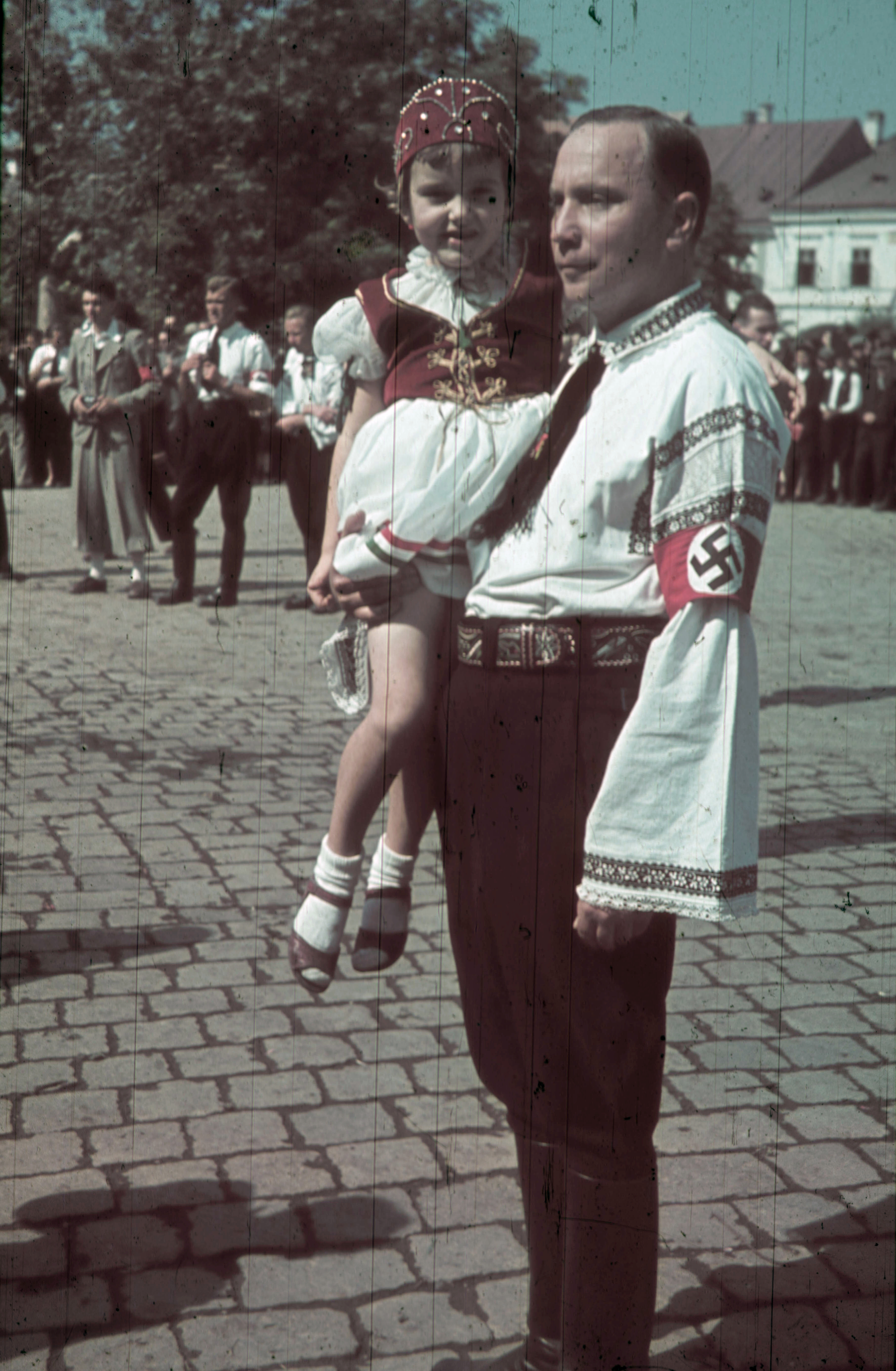 Fő tér (piata Centrala, ekkor Horthy Miklós tér) a magyar csapatok bevonulása idején. A felvétel 1940. szeptember 8-án készült. Location: Romania, Transylvania, Bistrita Tags: colorful, swastica, folk costume Title: Fő tér (piata Centrala, ekkor Horthy Miklós tér) a magyar csapatok bevonulása idején. A felvétel 1940. szeptember 8-án készült.